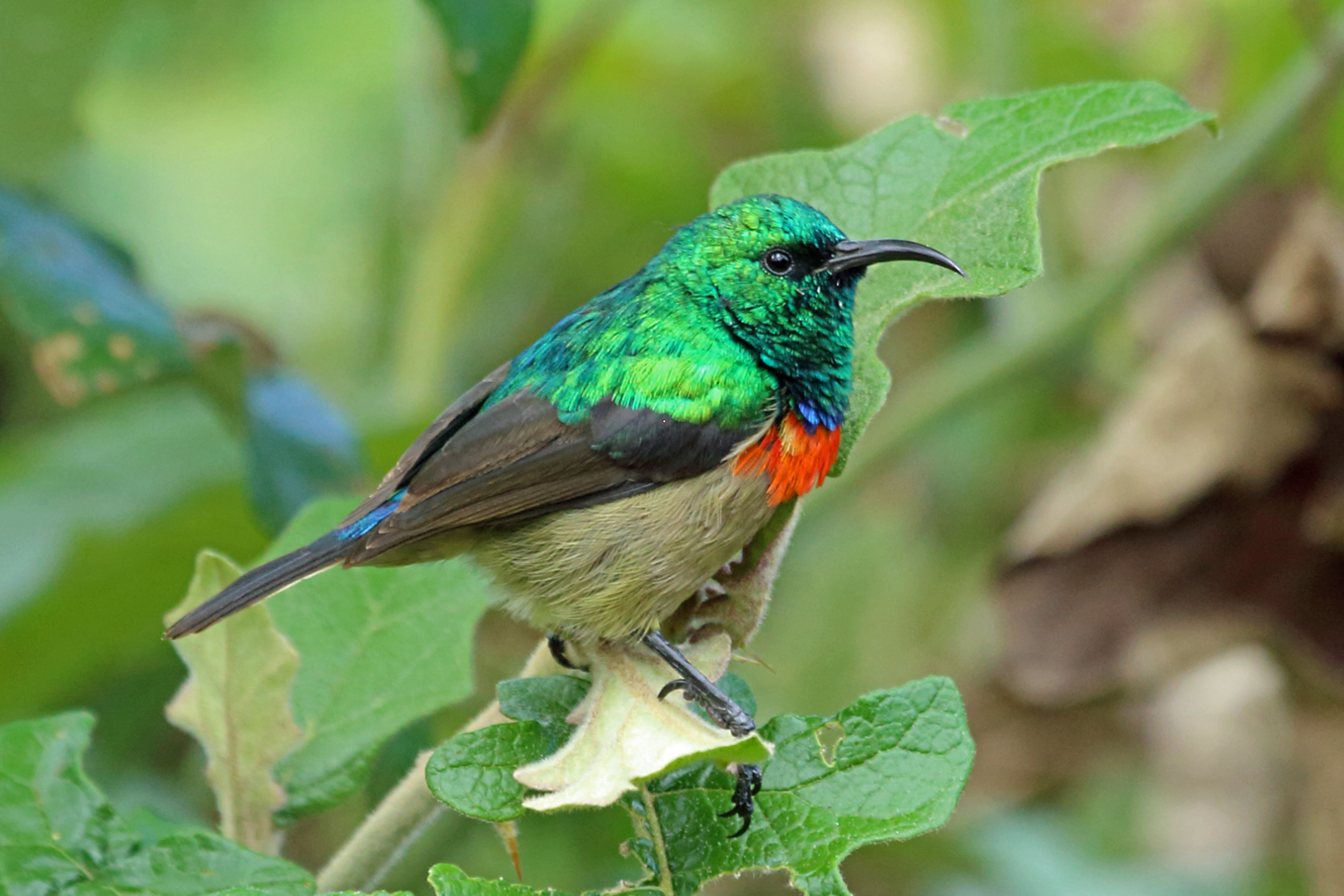 Male